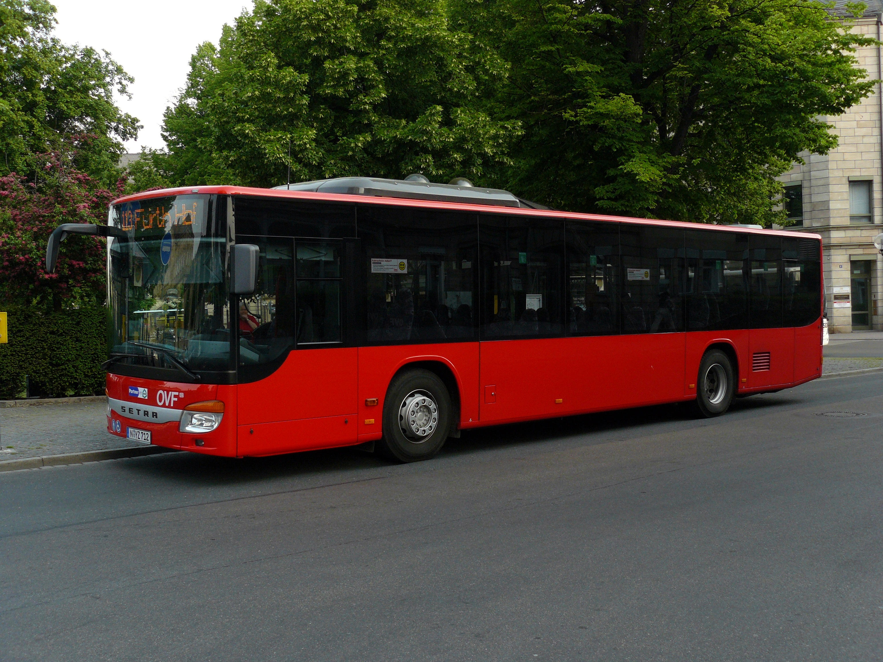 Setra-Bus der OVF GmbH steht an der Endhaltestelle Fürth Hauptbahnhof der Fahrt 3765 020